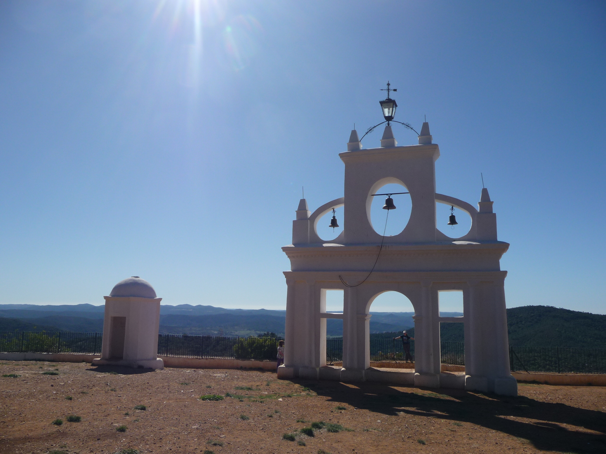 SierraDeAracena-P1040876.JPG